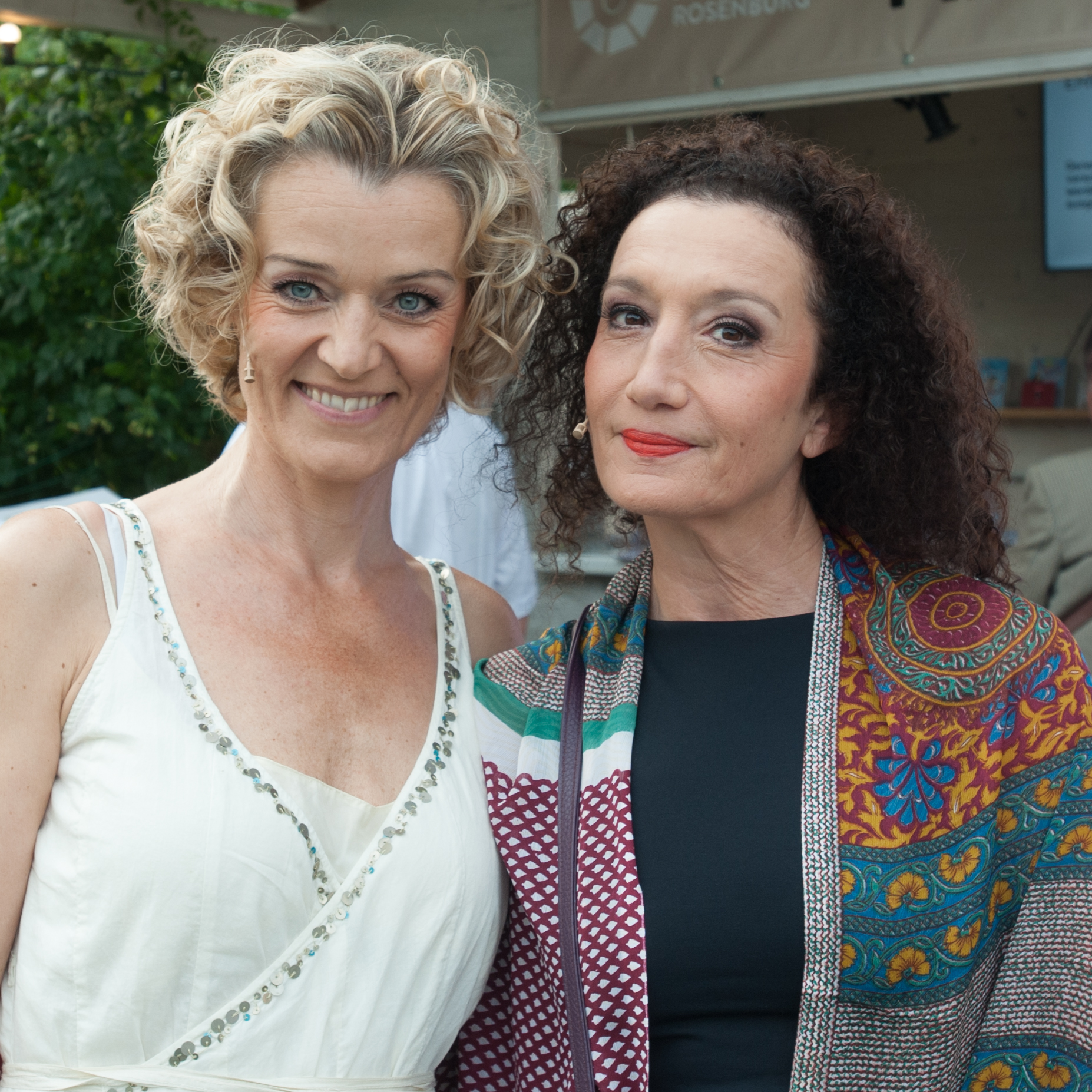 Sommernachtskomödie Rosenburg 2016, Premiere von Kalender Girls am 30. Juni 2016. Bild zeigt Konstanze Breitebner und Hemma Clementi.